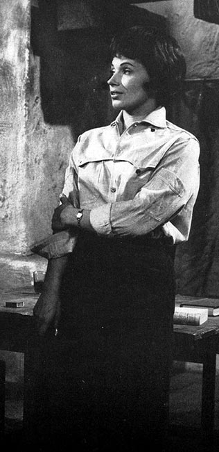 Gunnel Lindblom i Smutsiga händer av Sartre. TV-teater 1963